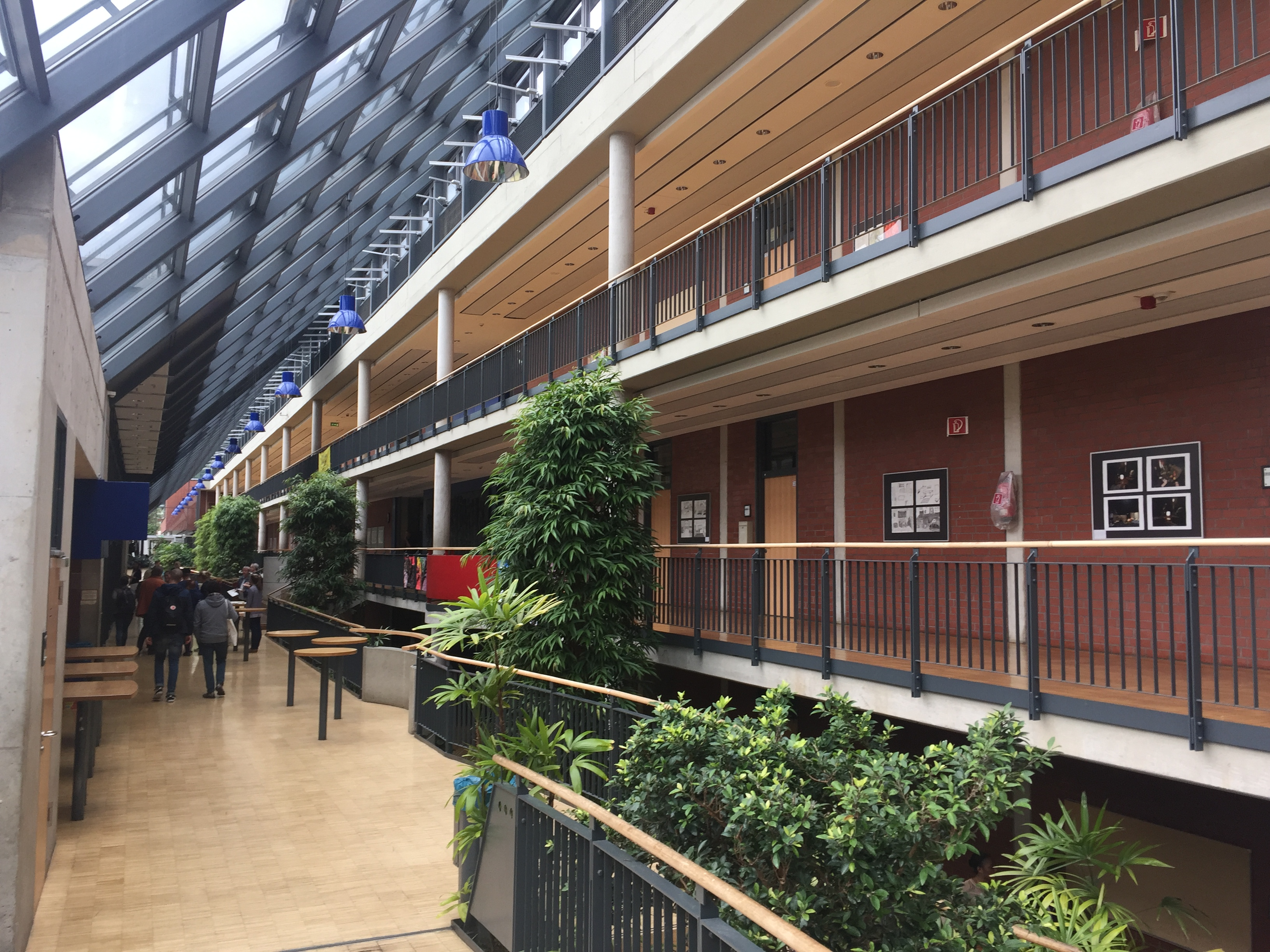 Unterdörnen, Wuppertal